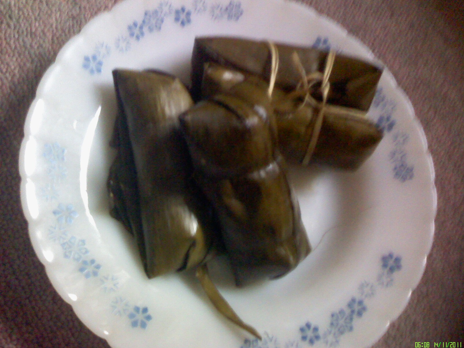 Leupeut, makanan tradisional Sunda, Indonesia